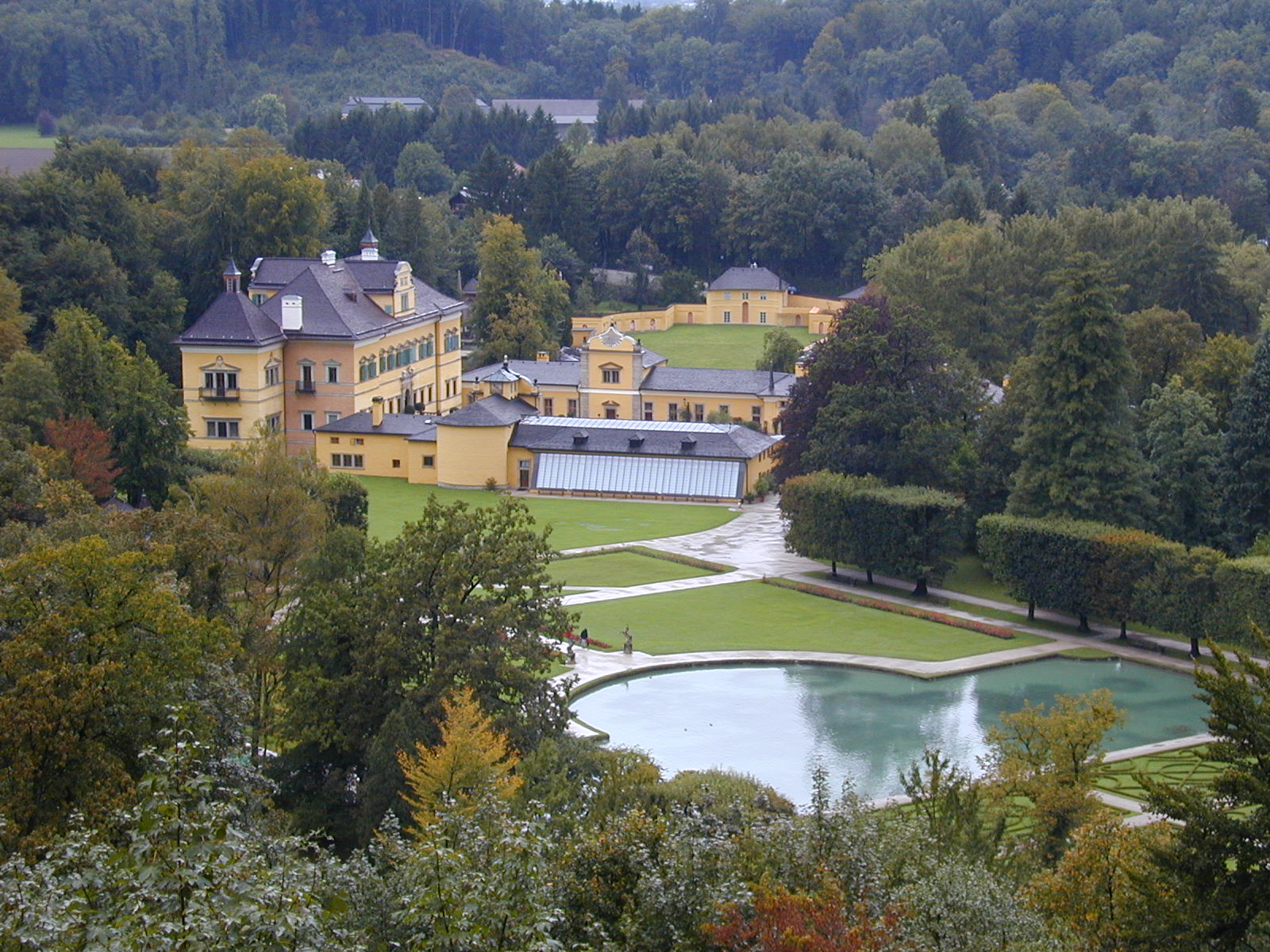 Schloss Hellbrunn vom Monatsschlössl aus gesehen.